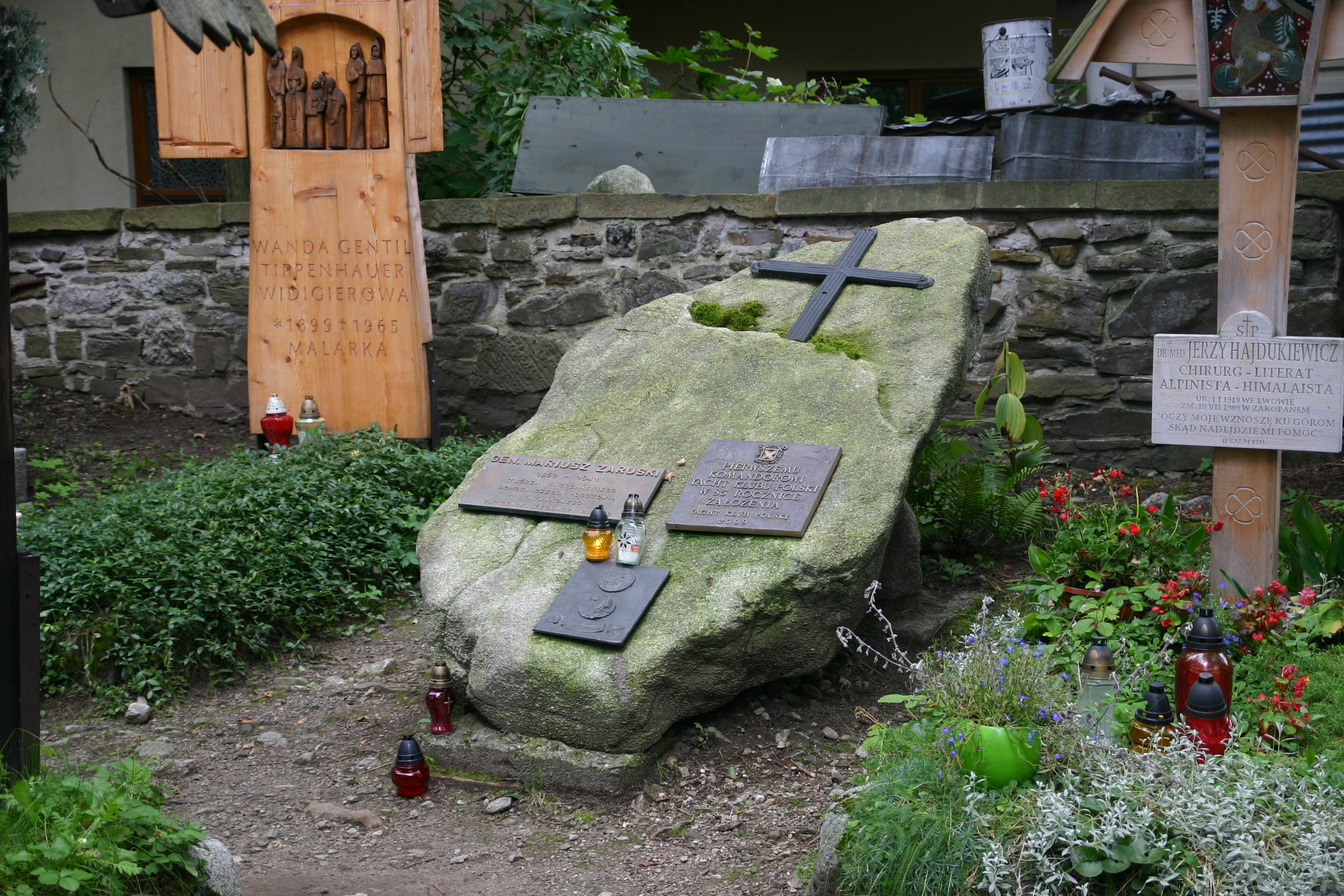 Grób Mariusza Zaruskiego na Pęksowym Brzyzku w Zakopanem